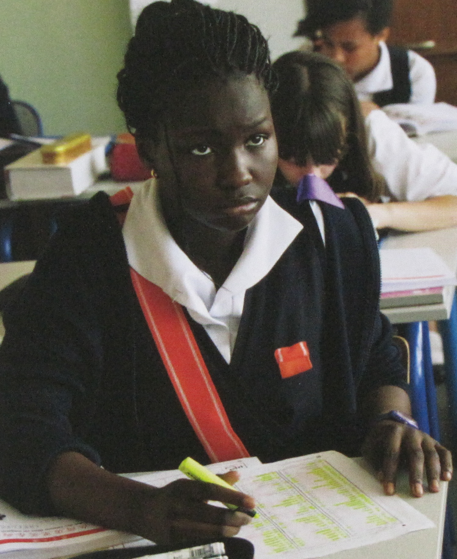 Une élève de Seconde (nacarat) de la Maison d'éducation de la Légion d'honneur à Saint-Denis.